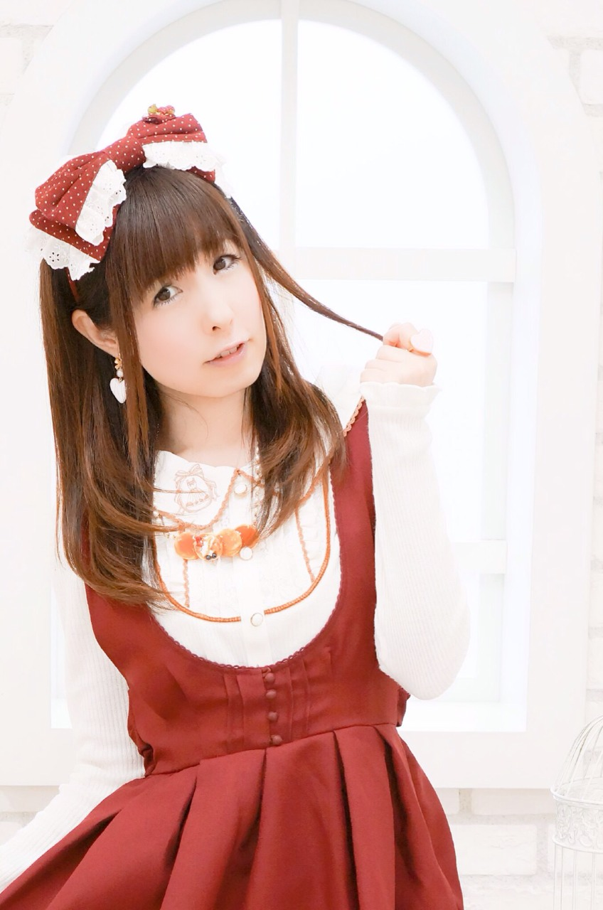 プロフィール写真